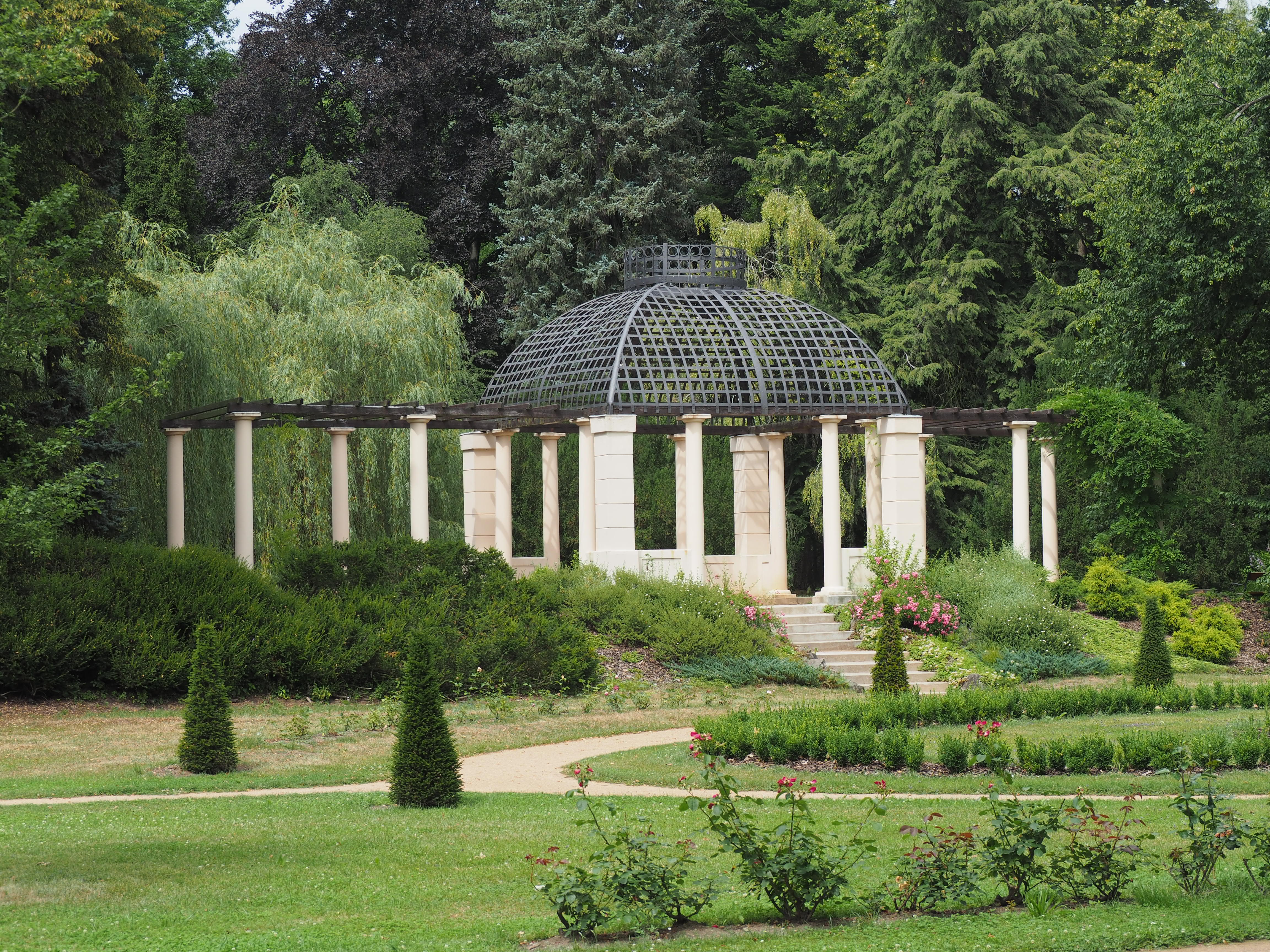 Krásný zámeček, který má hezký park ve Zruči nad Sázavou stojí za návštěvu během putování po Posázaví.